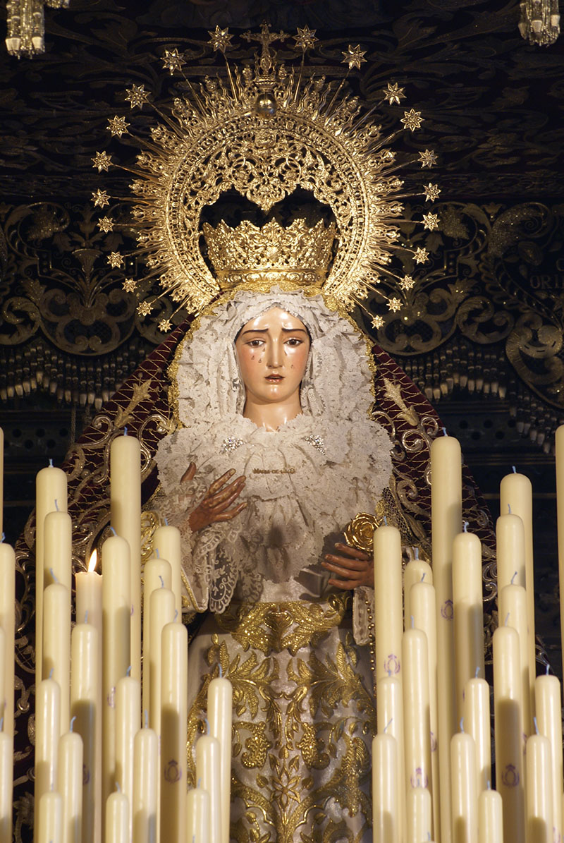 Fotografia realizada por Manuel Francisco Álvarez Ruiz.